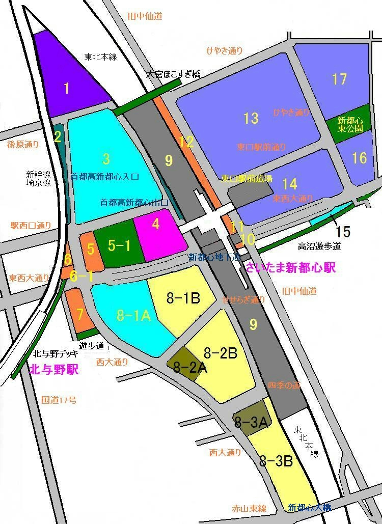 さいたま新都心の街区と道路の地図。2009年1月初旬に利用者Gakujin氏が作成したものを利用者koubusanが一部編集。